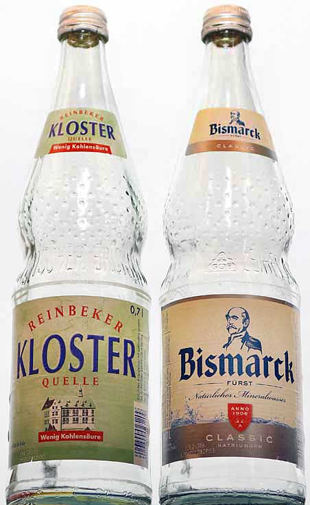 Flaschen Reinbeker Klosterquelle und Fürst Bismarck